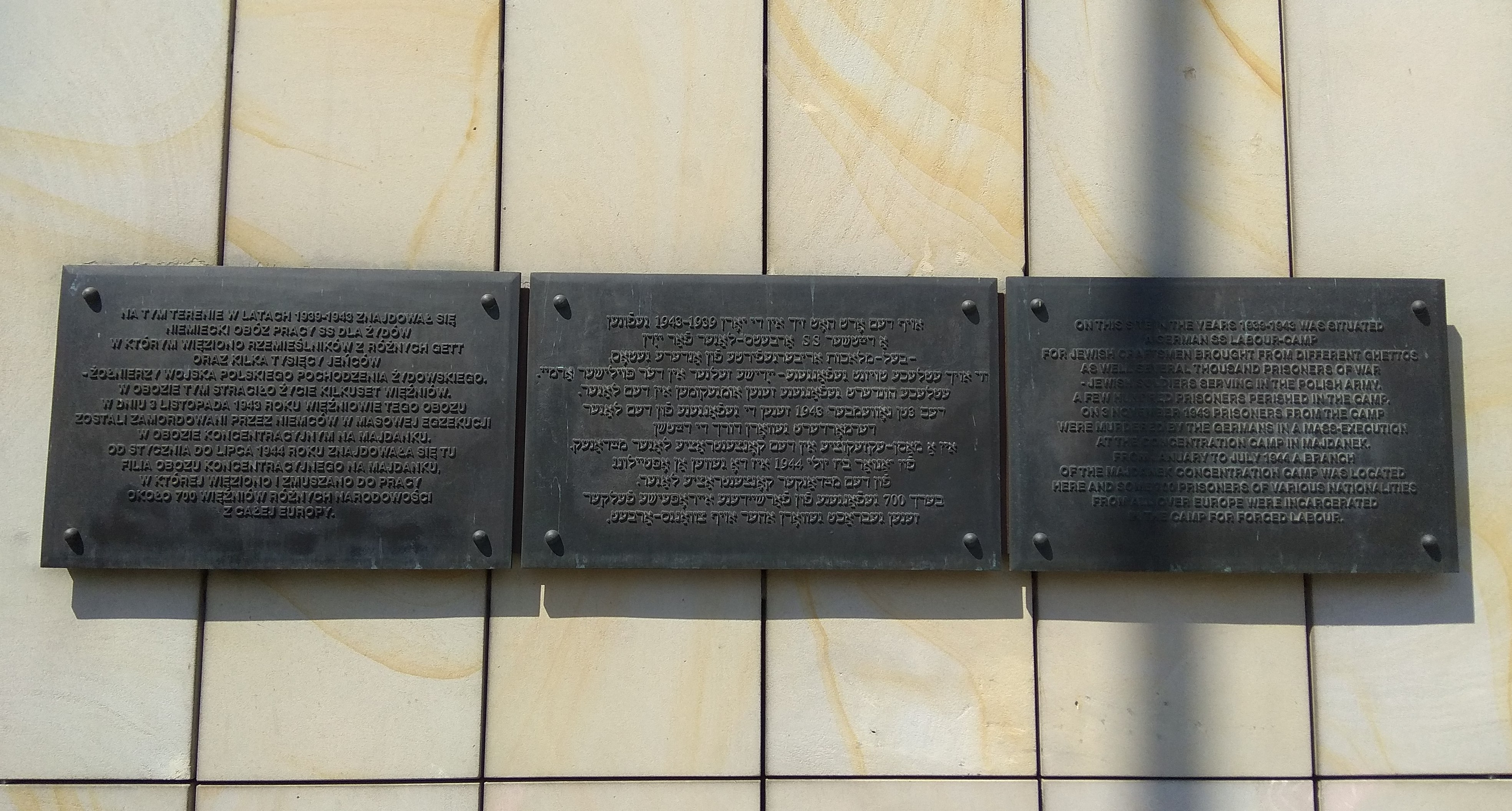 Tablica, upamiętniającą ofiary obozu pracy przy ul. Lipowej w Lublinie